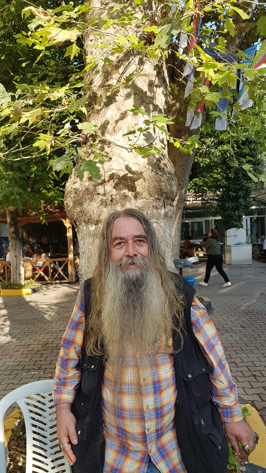 Kadıköy Mesleki ve Teknik Anadolu Lisesi bahçesinde düzenlenen KadFest Çizgi Sahaf'ın ilk gününde şair Hüseyin Avni Dede.